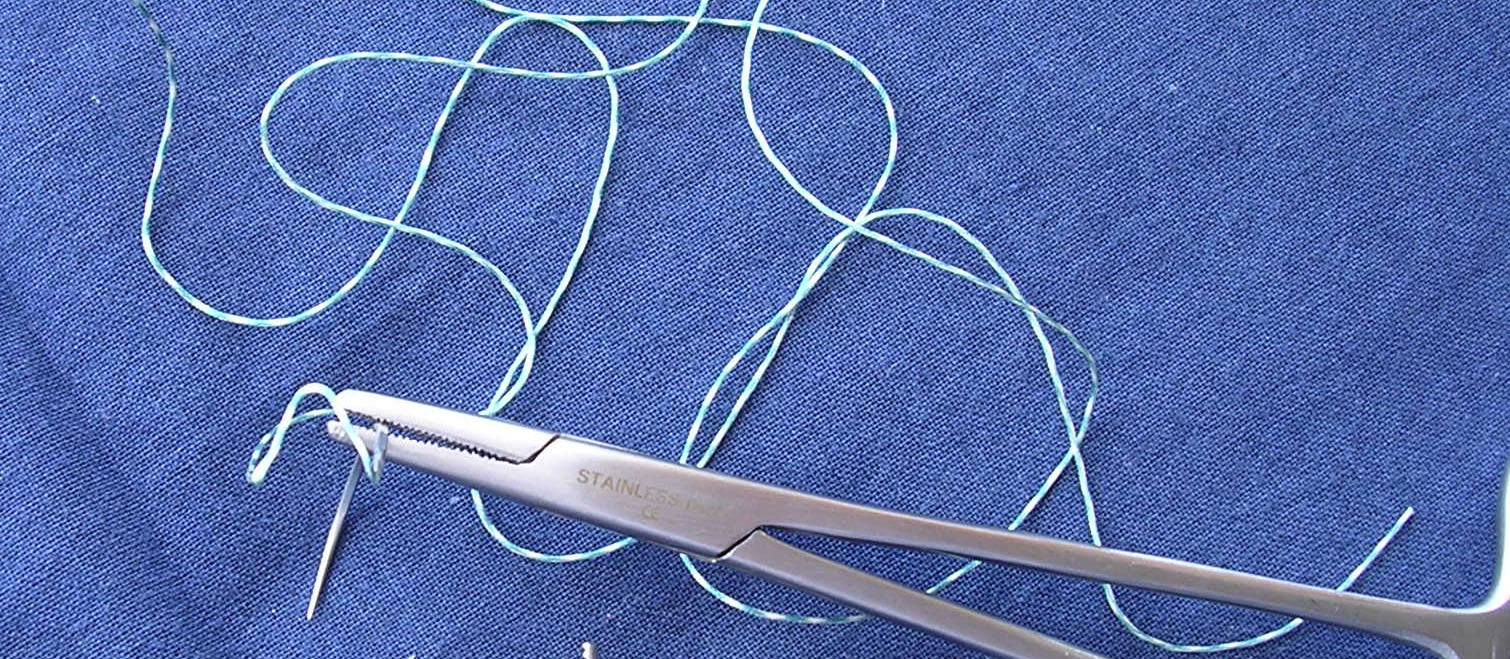 Foto scattata personalmente Si rilascia in pubblico dominio